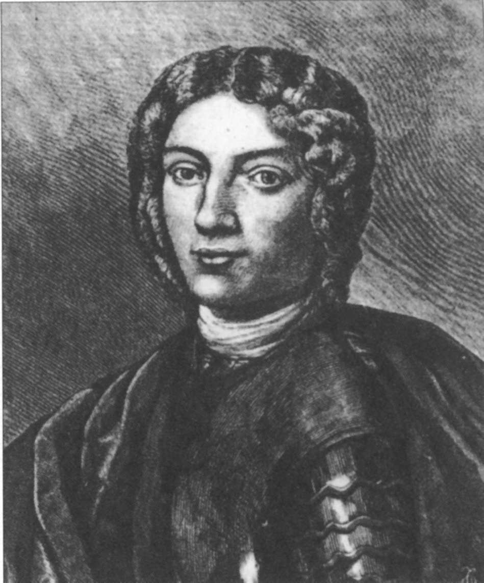 Marcin Kazmierz Kątski (1635-1710), polish general